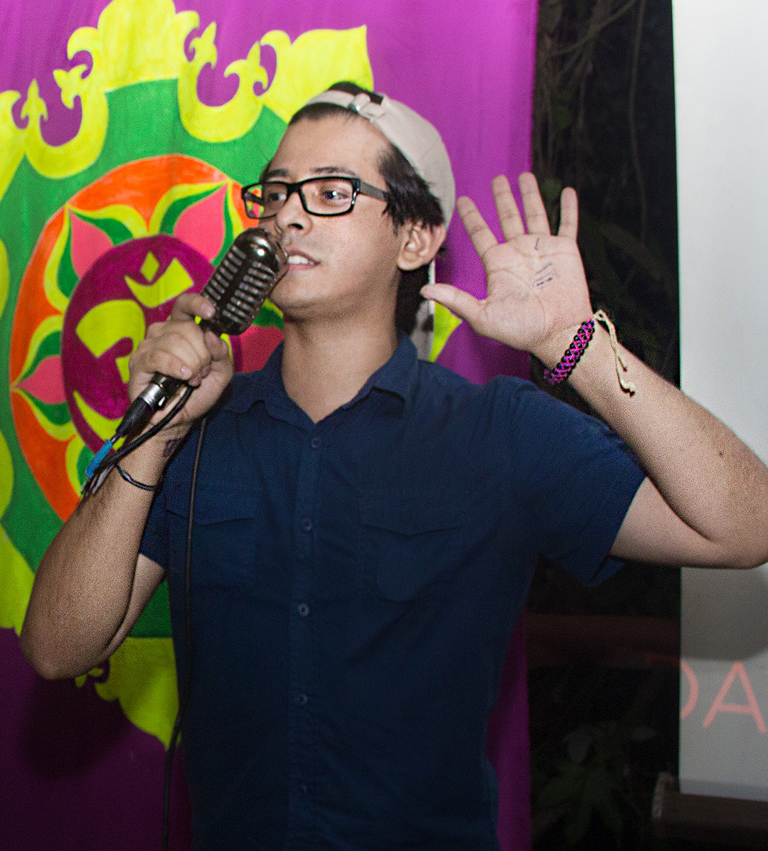 Alexian Kernel en una presentación en vivo de su Pocket Tour en Iquitos.